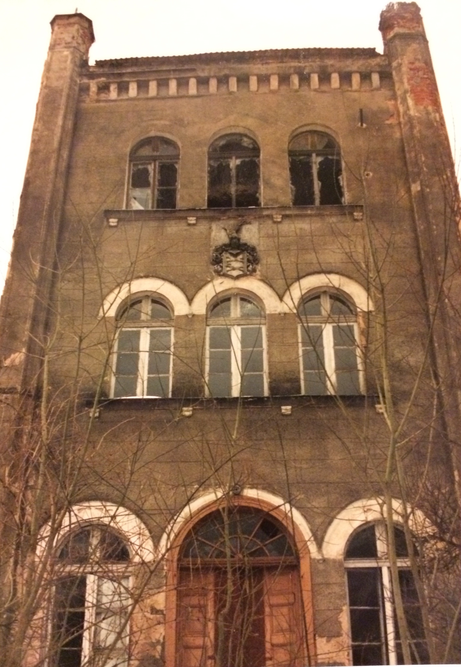 Rückansicht mit Wappen derer v. Borcke